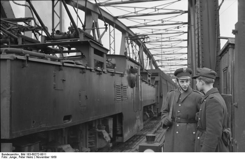 Hirschfelde, Braunkohle aus Polen, Grenzposten Zentralbild/Junge 25.11.1958 Kraftwerk Hirschfelde erhält täglich 10000 Tonnen Braunkohle aus Polen. Unmittelbar an der Staatsgrenze gelegen verarbeitet das Kraftwerk Hirschfelde täglich 10000 t Braunkohle aus der Grube Turow 1 der Volksrepuplik Polen. Als Gegenleistung erhält Polen Strom. Aber es werden auch durch die DDR Ausrüstungen wie Schaufelbagger und Absetzer AS 1120 für die Gruben Turow 1 und Turow 2 geliefert. UBz.: An der Staatsgrenze der Volksrepublik Polen und der DDR. Von links nach rechts: der polnische und deutsche Grenzposten bei einer dienstlichen Absprache.